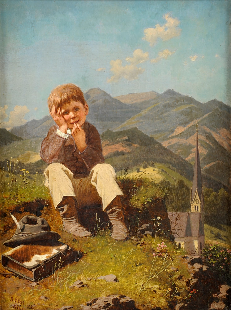 The Little Truantlabel QS:Lde,"Der kleine Schulschwänzer"label QS:Len,"The Little Truant"label QS:Lpl,"Mały wagarowicz"